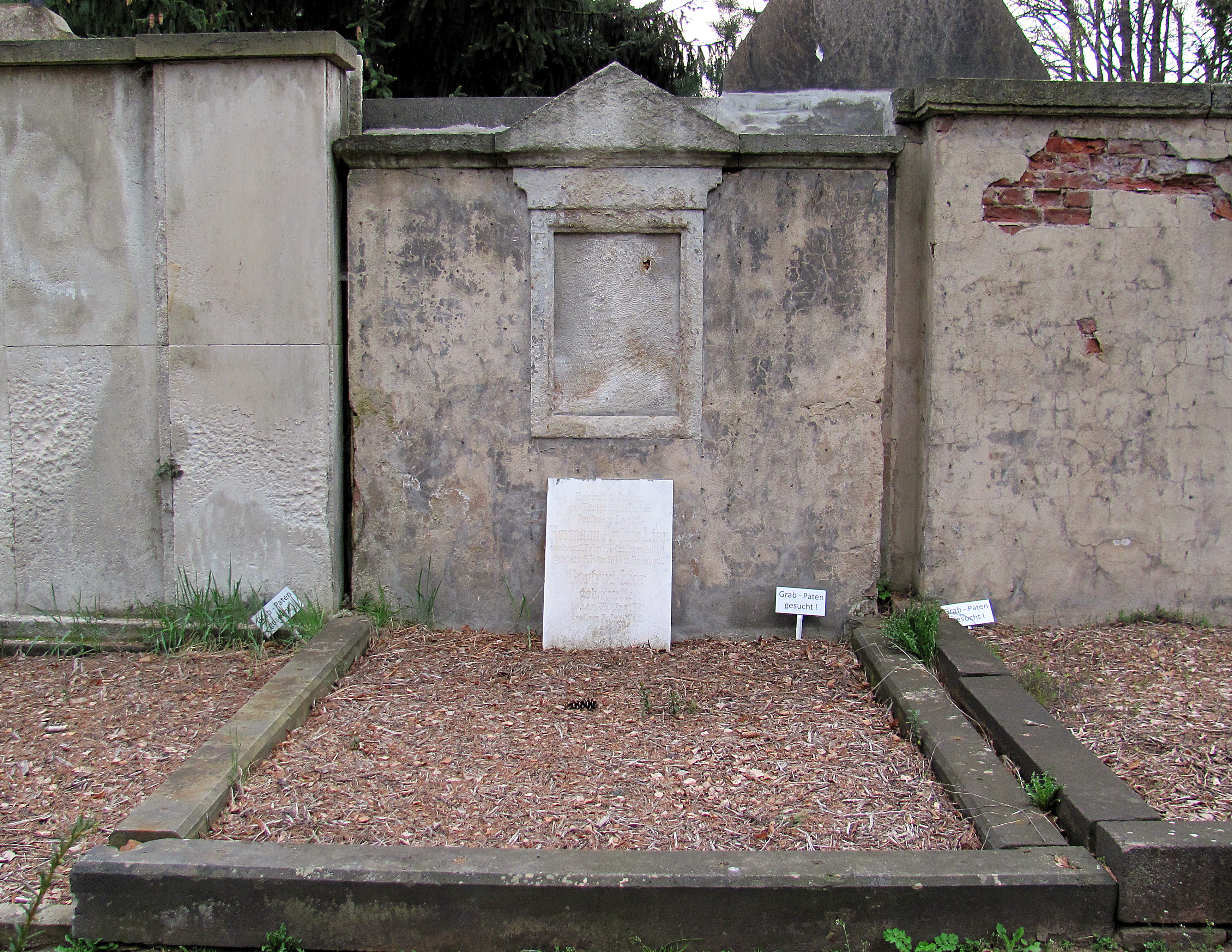 Radebeul, Friedhof Radebeul-West, Grabmal von Hermann Arthur Lier